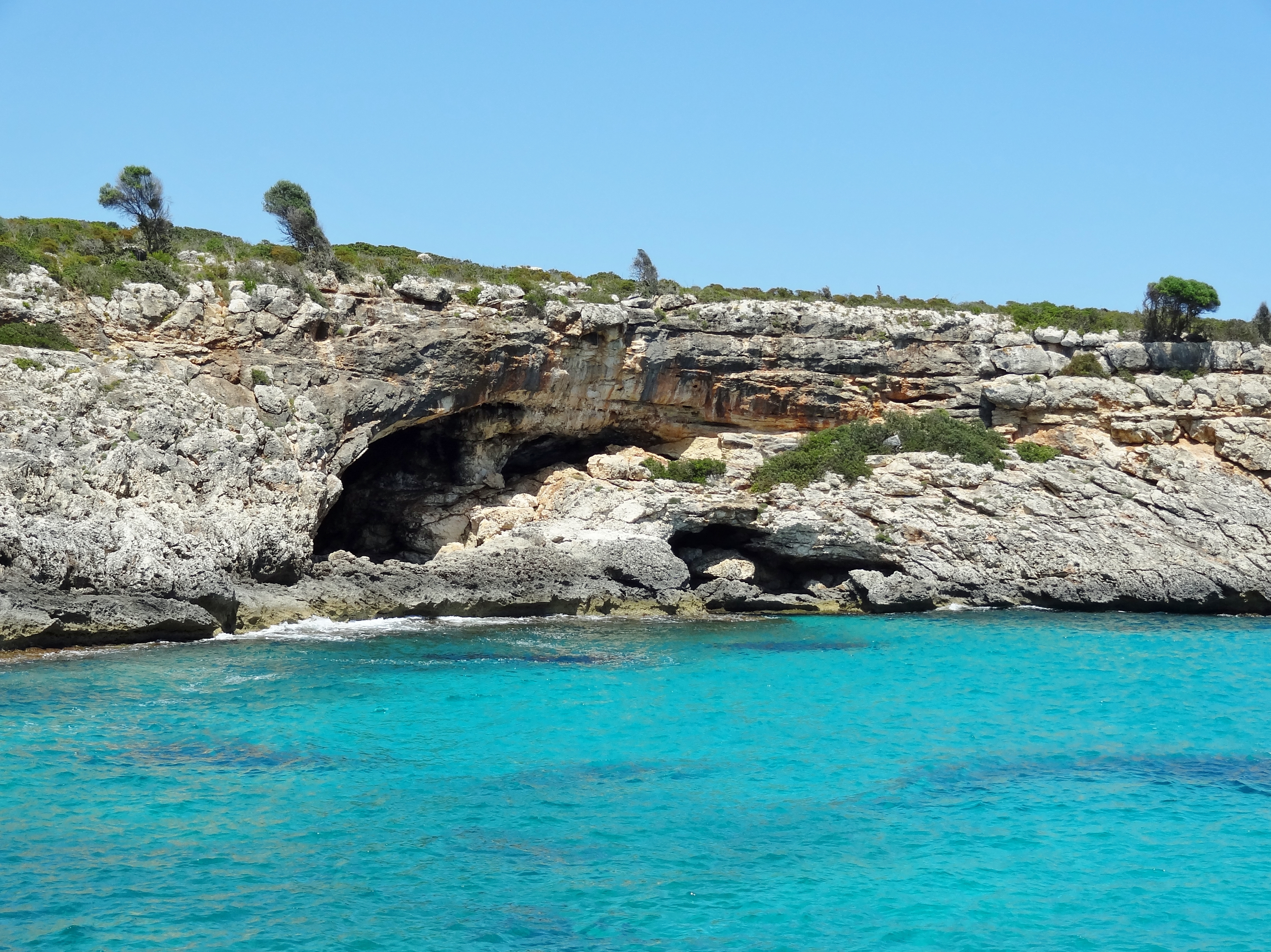 Die Cova de ses Dones an der Cala Virgili, Gemeinde Manacor, Mallorca, Spanien